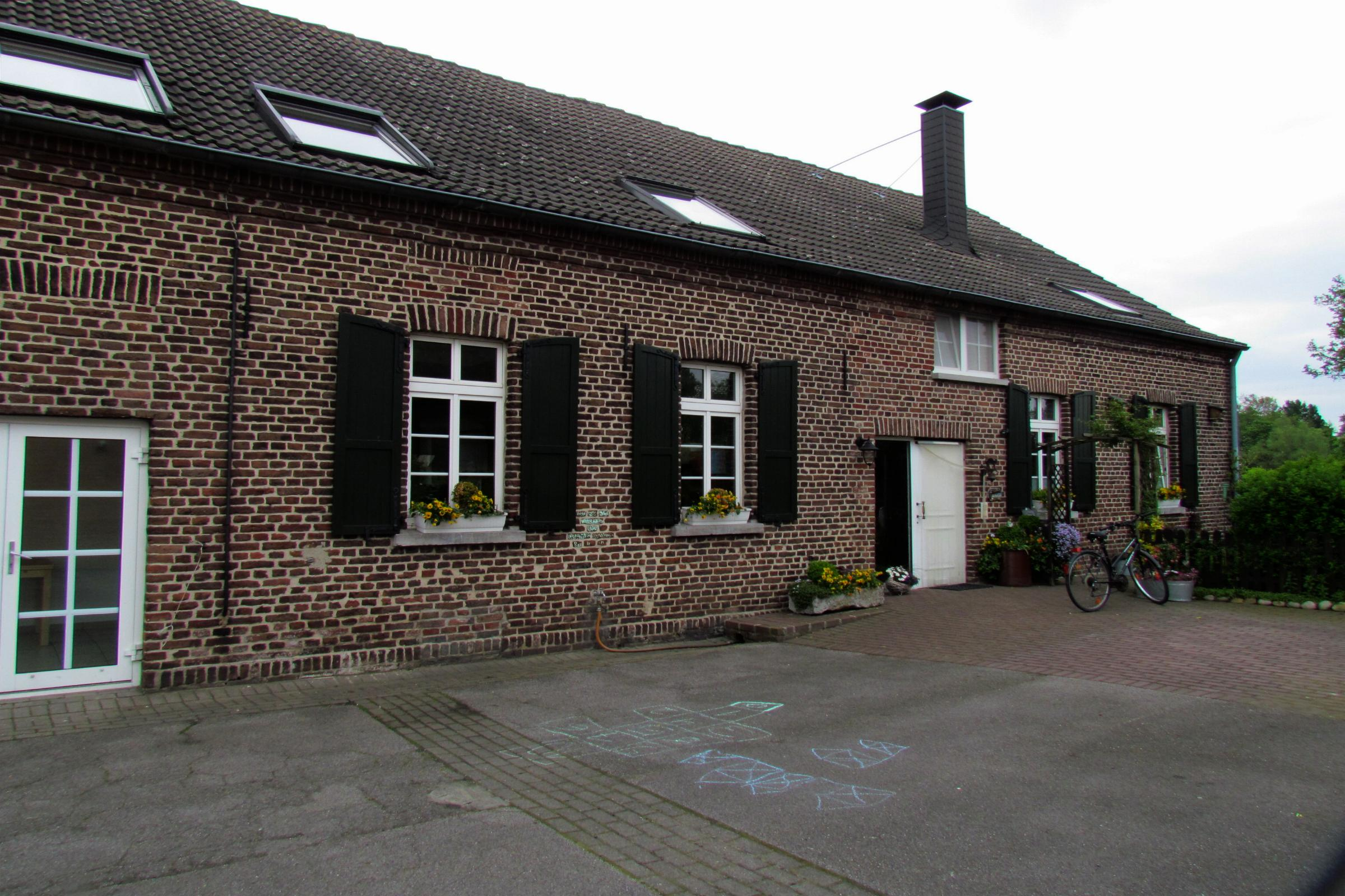 Das ehemalige Mühlenhaus der Nettmühle